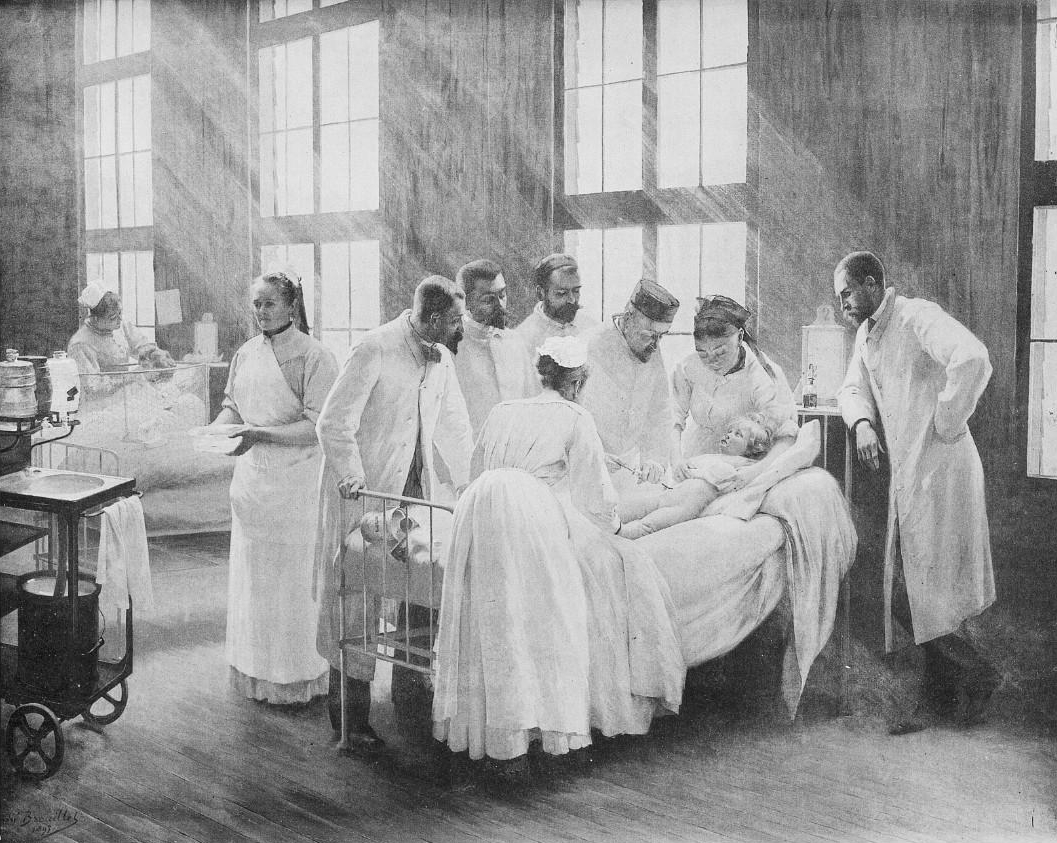 Le vaccin du croup par André Brouillet (1857-1914). Héliogravure parue dans la revue L'Œuvre d'art du 5 mai 1895.